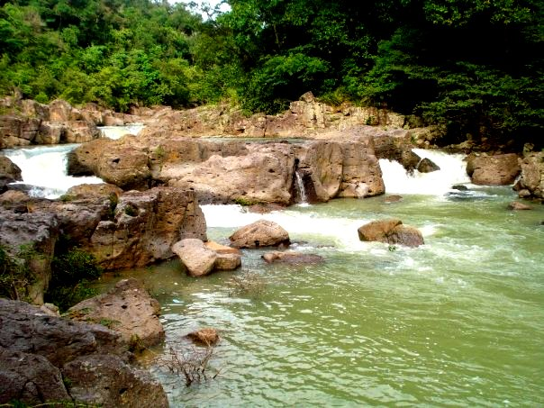 Aguas cristalinas